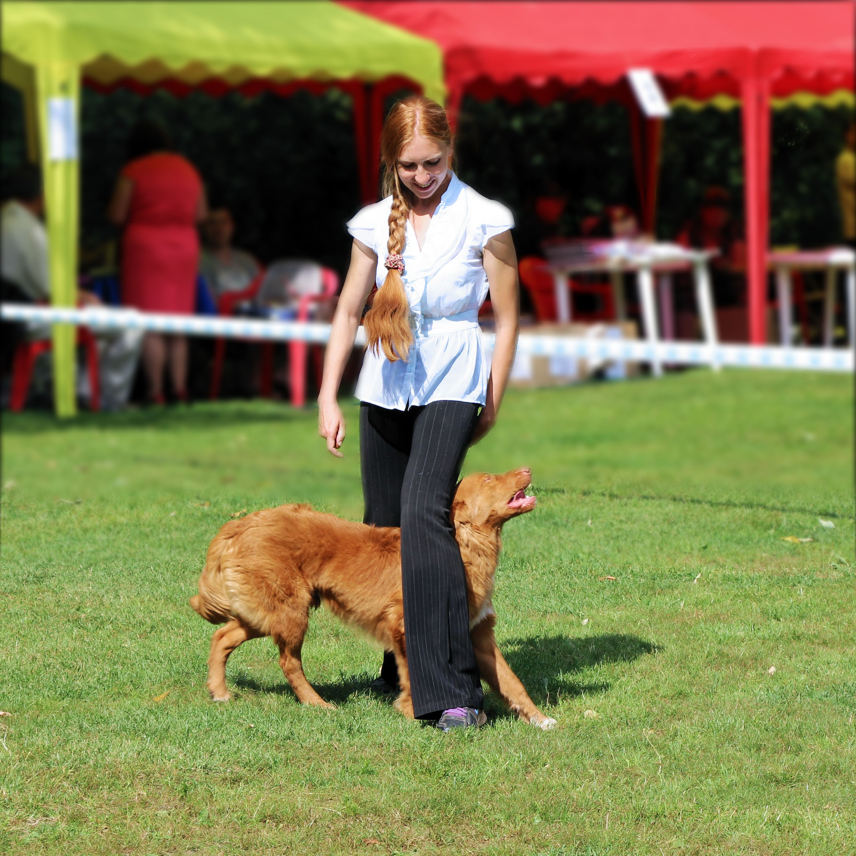 Танцы с собакой. Выступление на XX шоу. Москва. Сокольники.